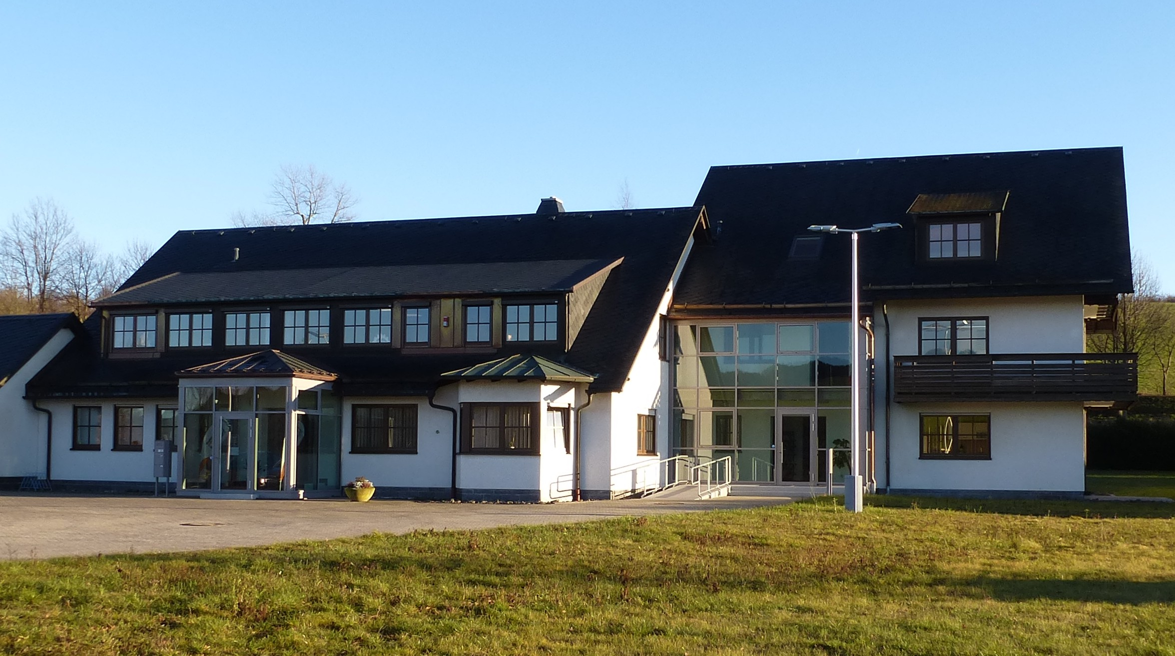 Firmengebäude der Stadtwerke Oelsnitz (Vogtl.)